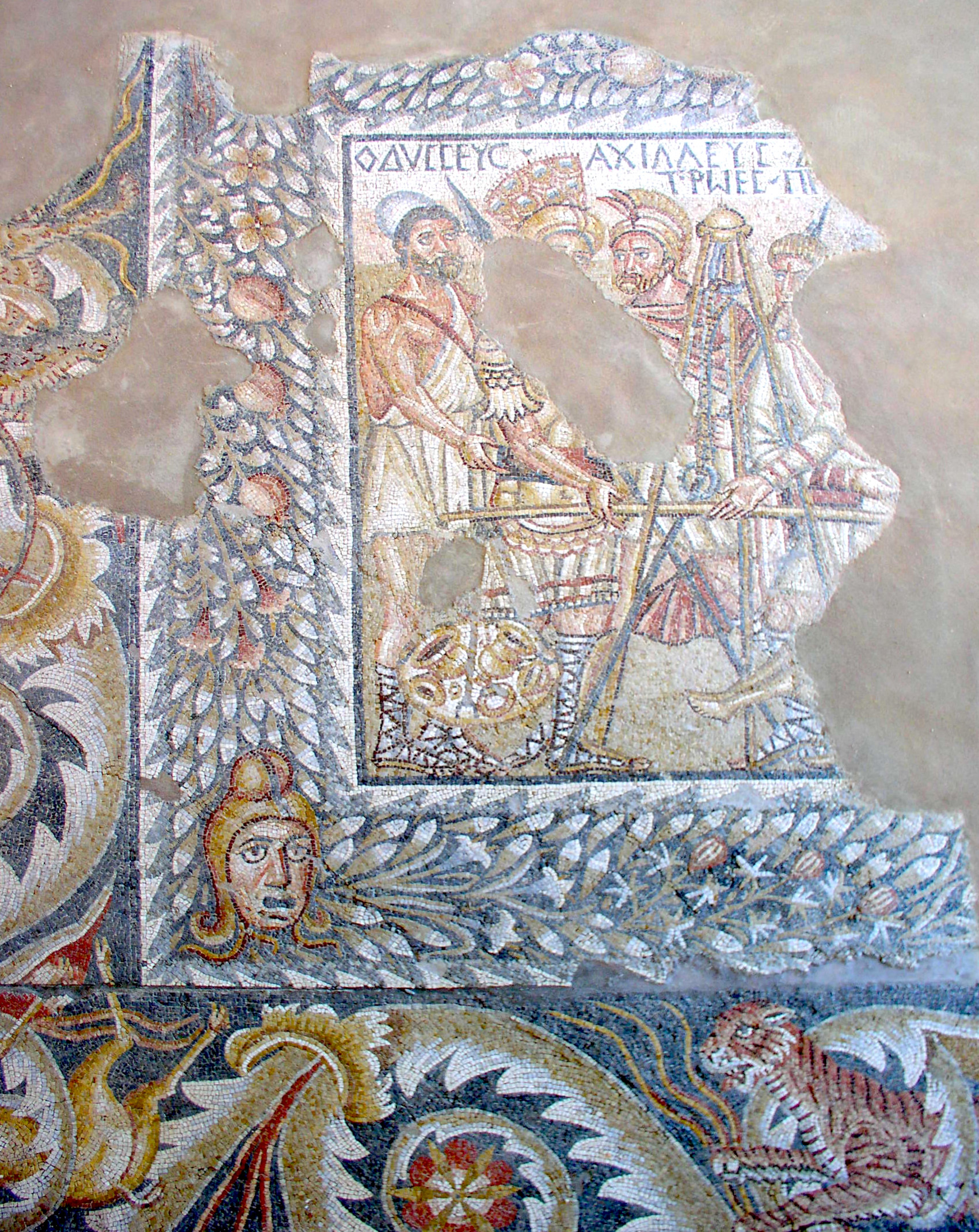 Détail de la "mosaïque de la restitution du corps d'Hector" dans la villa romaine de Tellaro à Noto (Syracuse). La scène est inspirée du chant XXIV de l'Iliade. Les personnages sont identitiés par des inscriptions en grec ancien.